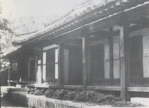 대한민국 제3대 국무총리, 제1대 외무부장관 장택상 생가